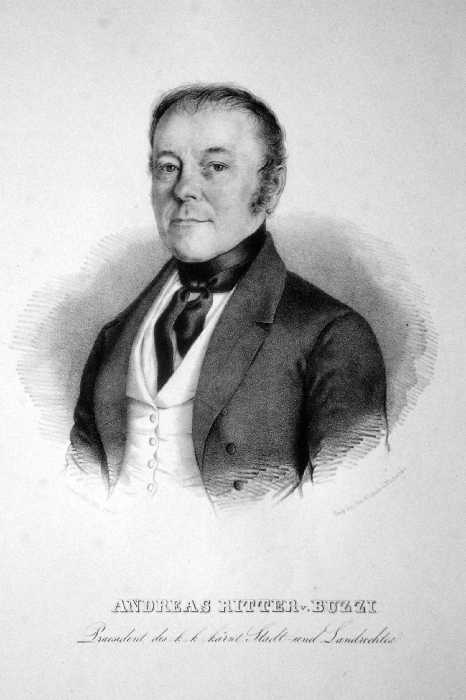 Andreas von Buzzi (1779-1864), Jurist, Richter in Klagenfurt, Dichter. Lithographie von August Prinzhofer, 1843